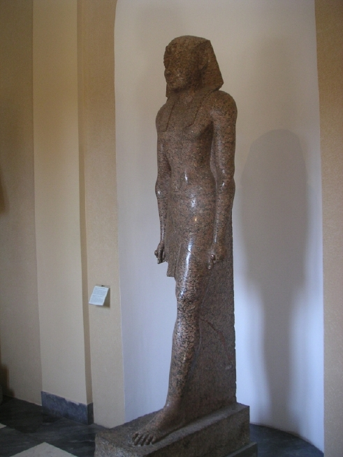 Statue colossale de Ptolémée II provenant d'Héliopolis - Museo Gregoriano du Vatican - Rome